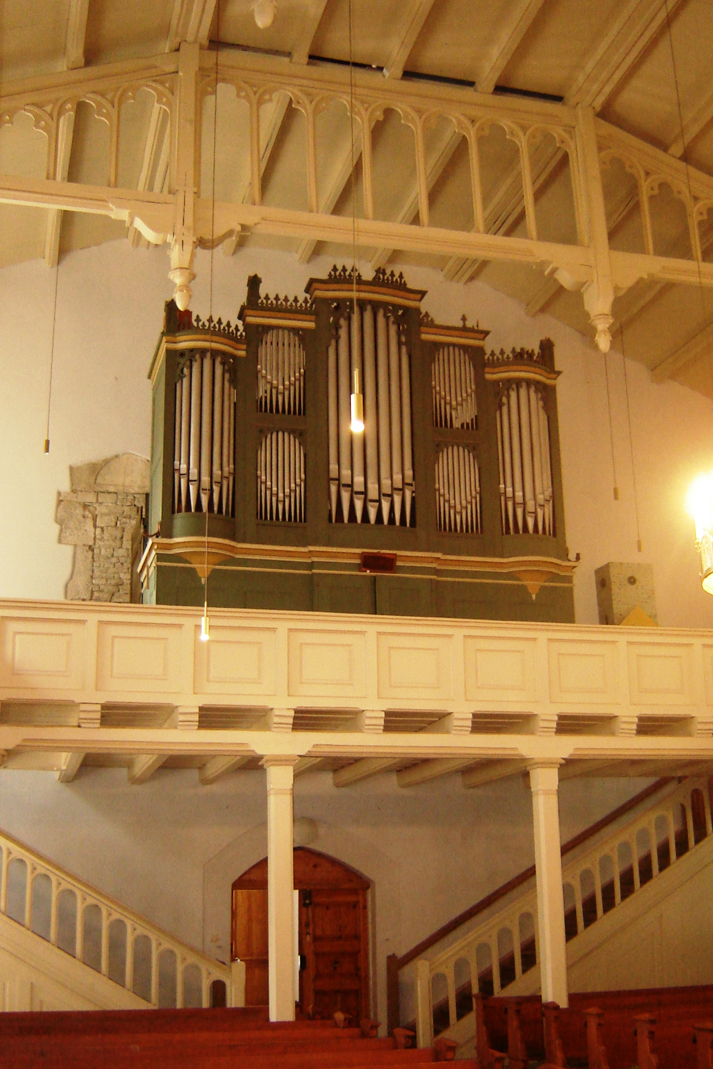 St.-Andreas-Kirche in Biere, Sachsen-Anhalt, Deutschland (Orgel)